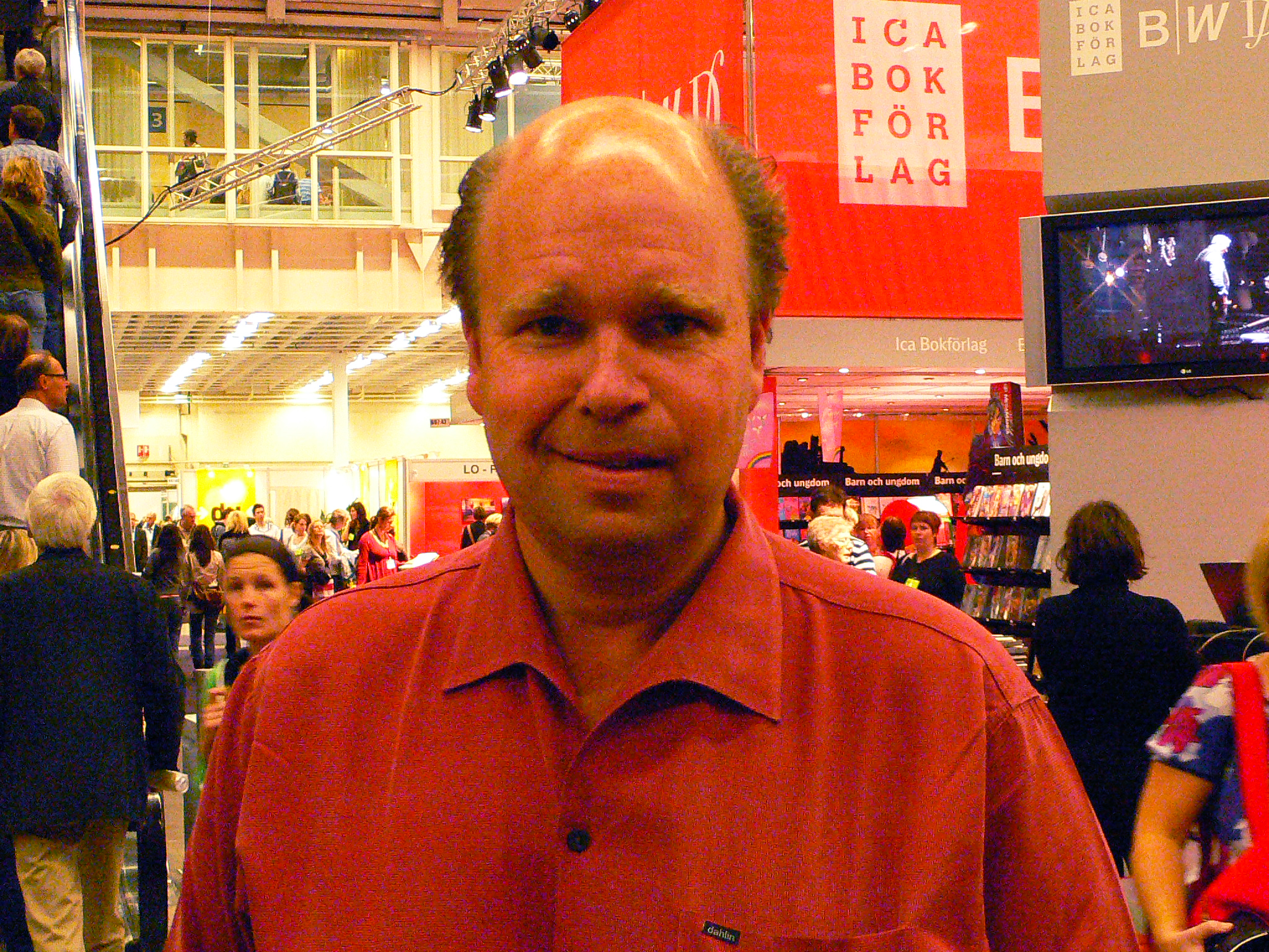 Lasse Kronér på Göteborgs Bok- och Biblioteksmässa 2007. Lasse Kronér at Gothenburg Book Fair 2007.